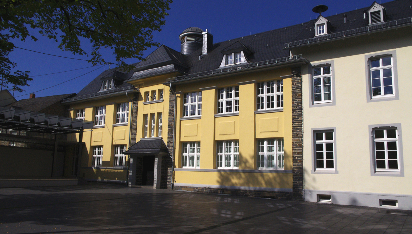 Schulhaus; Krüppelwalmdachbau, 1881, neuklassizistischer Erweiterungsbau, 1912/13, Architekt Bechtel, Trier